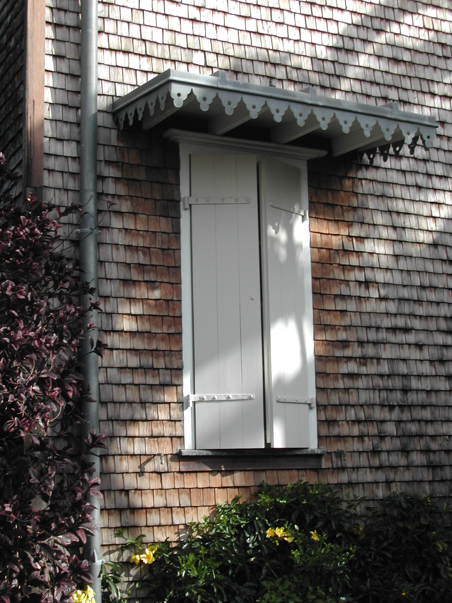 Photo d'une fenêtre munie de volets et d'un auvent, entourée de bardeaux sur la façade arrière de la villa Deramond-Barre à Saint-Denis de la Réunion.